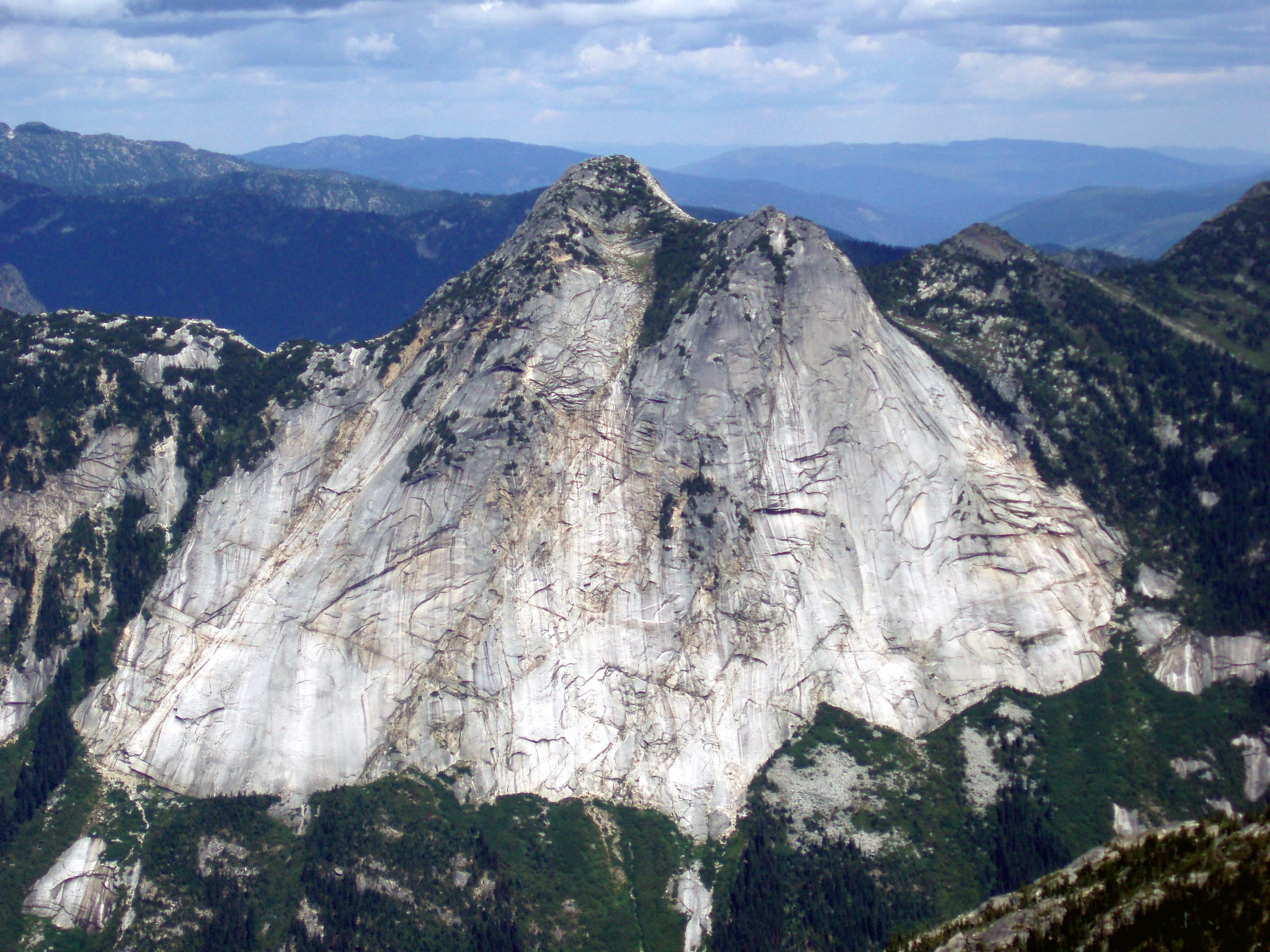 Yak Peak seen from Needle Peak.